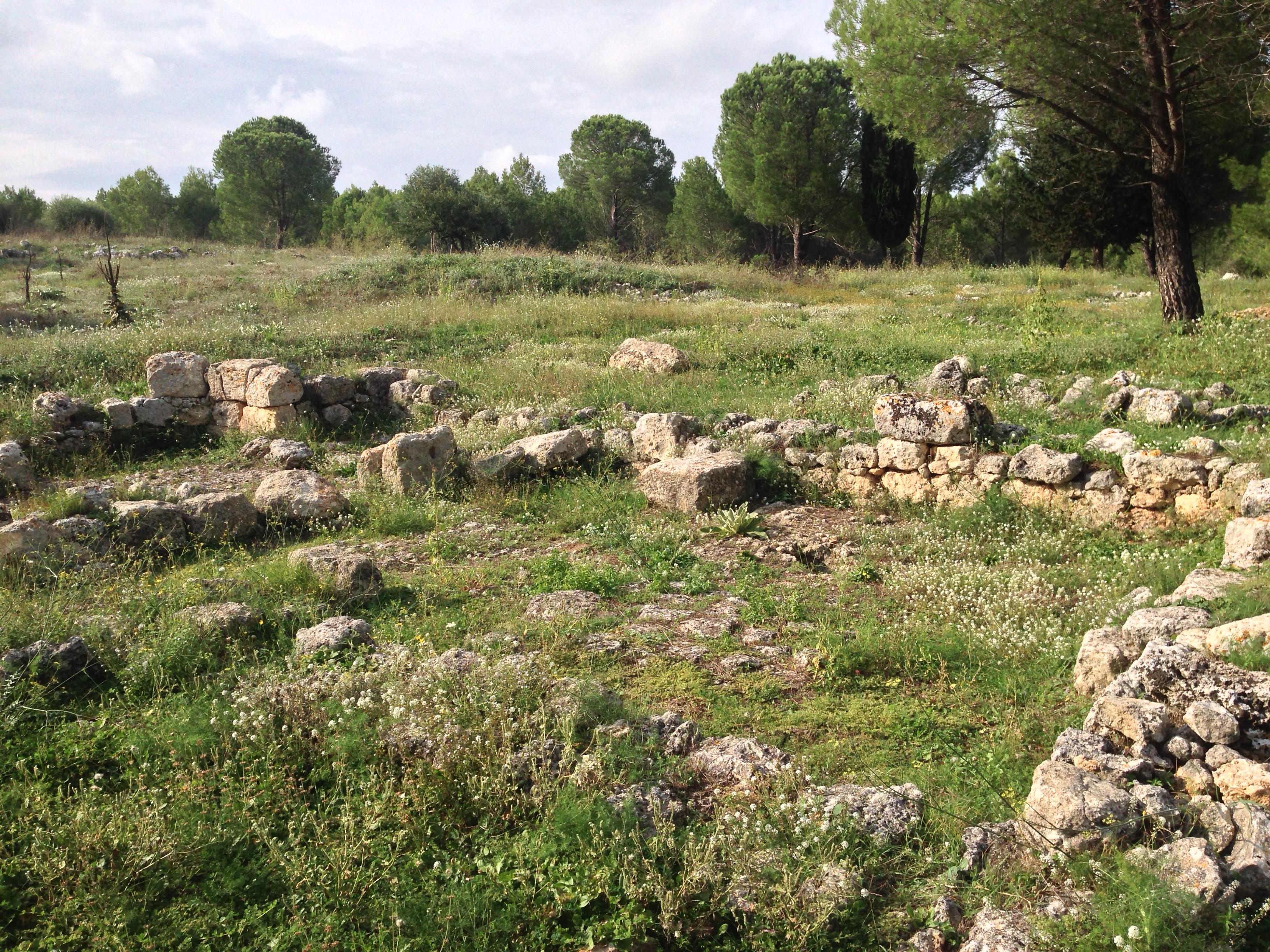 Resti di chiesa bizantina del VI-VIII secolo d.C.